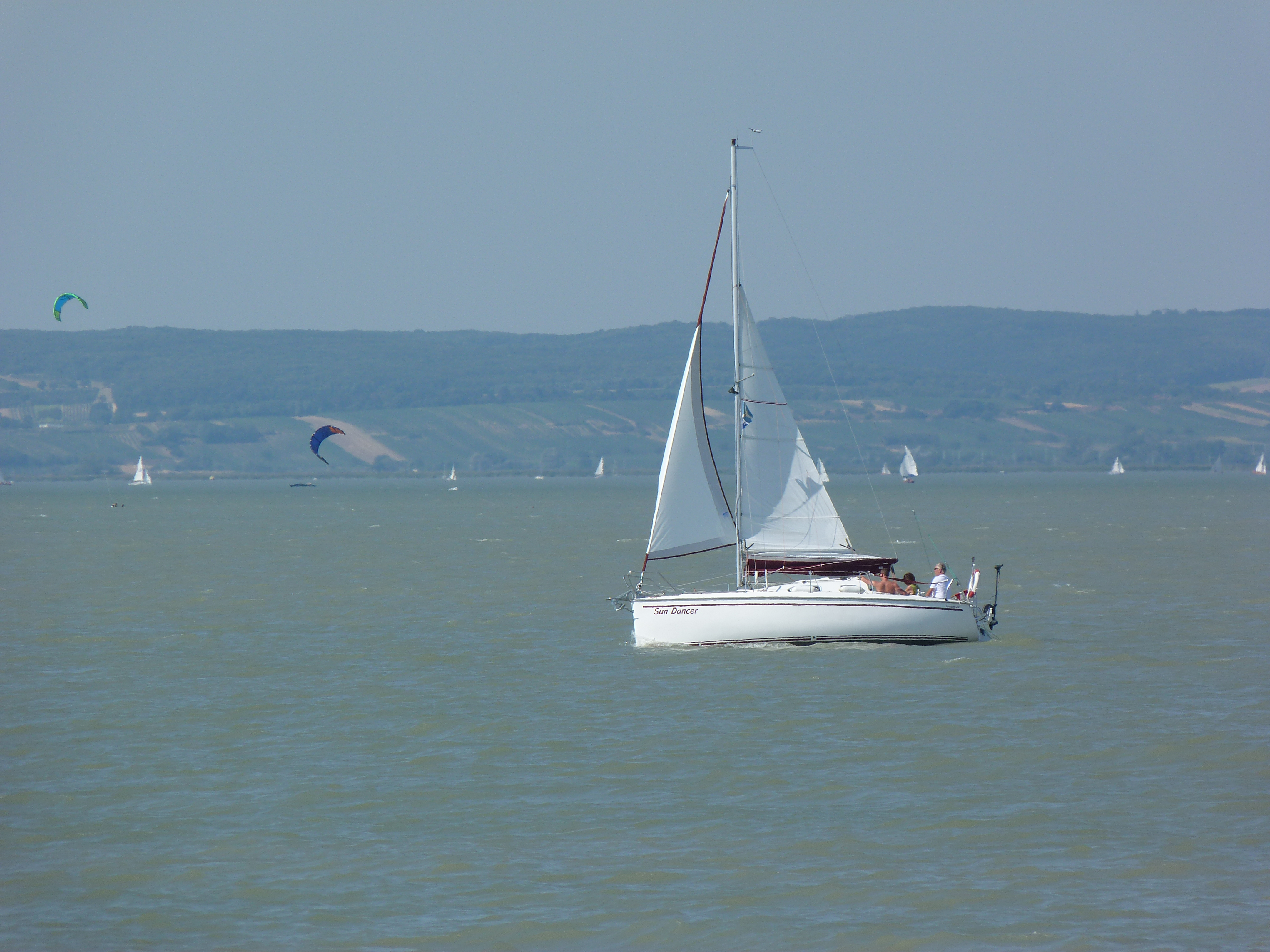 Die aufname ist am 18 August 2013 gemacht. Podersdorf am See. A felvétel 2013. Augusztus 18 –án, vasárnap készült Pátfalun, a Fertő tónál. (Podersdorf am See, 1920 –ig Moson vármegye Nezsideri járásához tartozott). Pátfalu a Fertő tó vidékének fő üdülőközpontja, jelenleg itt található a leghosszabb strand. A pátfalui strand Mosonmagyaróvárról megközelíthető a Mosonmagyaróvár – Mosonszolnok – Albertkázmérpuszta (határ) - Gálos – Pátfalu útvonalon. Ezen az Alberkázmérpuszta előtti 8 – 10 km-es útszakasz viszonylag gyengébb, de kocsival is járható. A Knoll hajójárat (Schifffahrt Knoll) 14.30 kor indult a világítótoronytól. A mintegy 1 órás hajóút Pátfalutól a szemközti partig (Ruszt, kiszállás nélkül) majd innen délre a magyar határhoz, végül vissza Pálfalvába a Fertő tó keleti oldalán vezet. Egy felnőtt jegy az utazásra 6 EUR. Forrás: schiffffahrt-knoll.at Zentrumplatz Mole Mobil +43 (0) 664/1317939 ©© Derzsi Elekes Andor, Budapest, 2013, You are authorised to use these photos and vids under Creative Commons – even for commercial, for profit purposes. Photos must be attributed to Derzsi Elekes Andor. All of the photos and vids in the Metapolisz DVD line are under Creative Commons and can be used even for commercial – for profit – purposes. Recommended Citation Derzsi Elekes Andor: Metapolisz DVD line